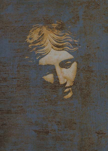 Benedek Imre (Budapest, 1972. február 22.) alkalmazott grafikus alkotása.